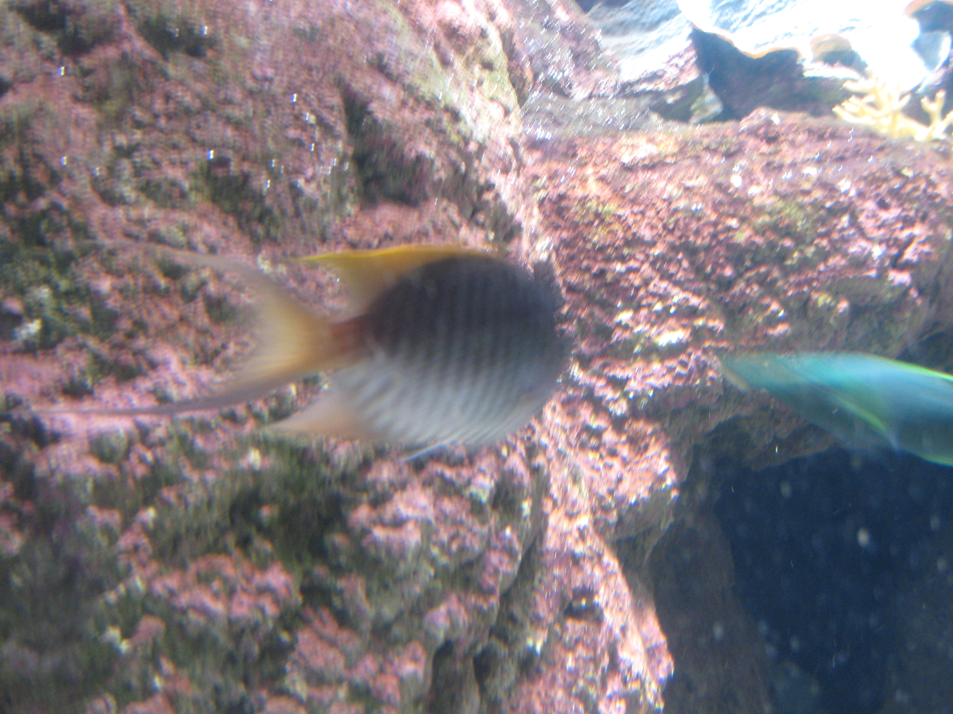 Genicanthus melanospilos à l'aquarium Cinéaqua